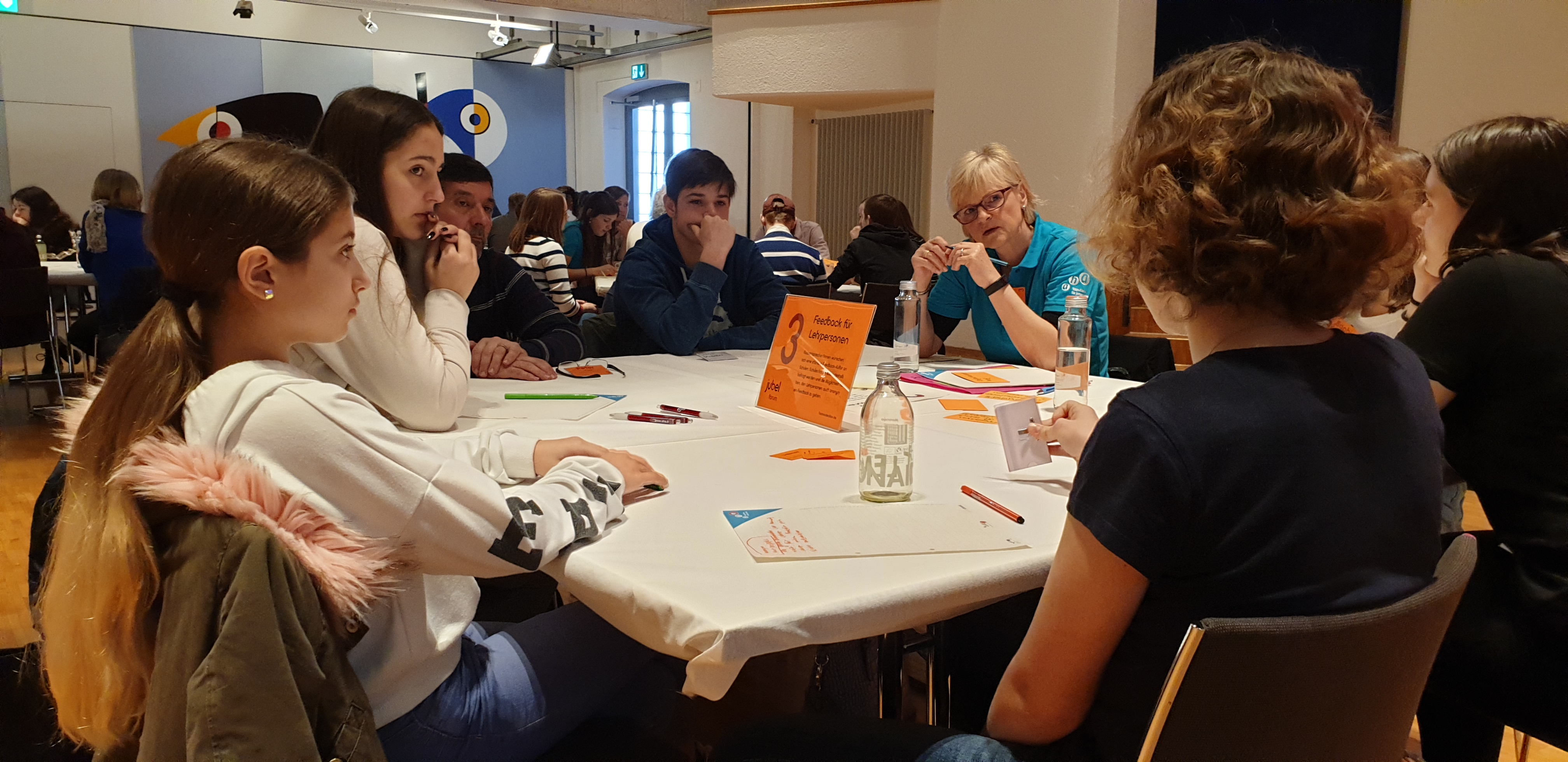 Austausch von Klassensprecher*innen und Erwachsenen beim jubel-Forum im März 2019 im SAL in Schaan.